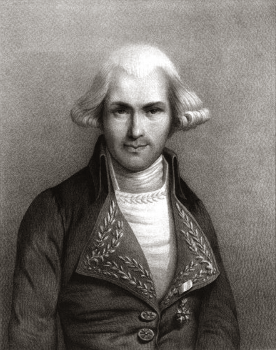 Album du Dauphiné - tome IV, litographie de Jean-Joseph Mounier